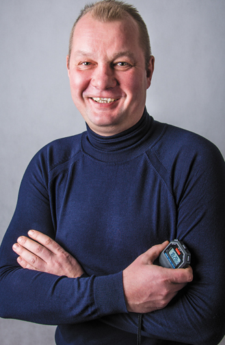 Николай Козлов. Заслуженный мастер спорта по водному поло. Серебряный призер Олимпийских игр (Сидней, 2000) и двукратный бронзовый призер Игр (Барселона, 1992; Афины, 2004), участник Игр в Атланте (1996), обладатель Кубка мира, победитель Мировой лиги, победитель Игр доброй воли, многократный чемпион и обладатель Кубка России. Фотография из серии «Лица эстафеты».